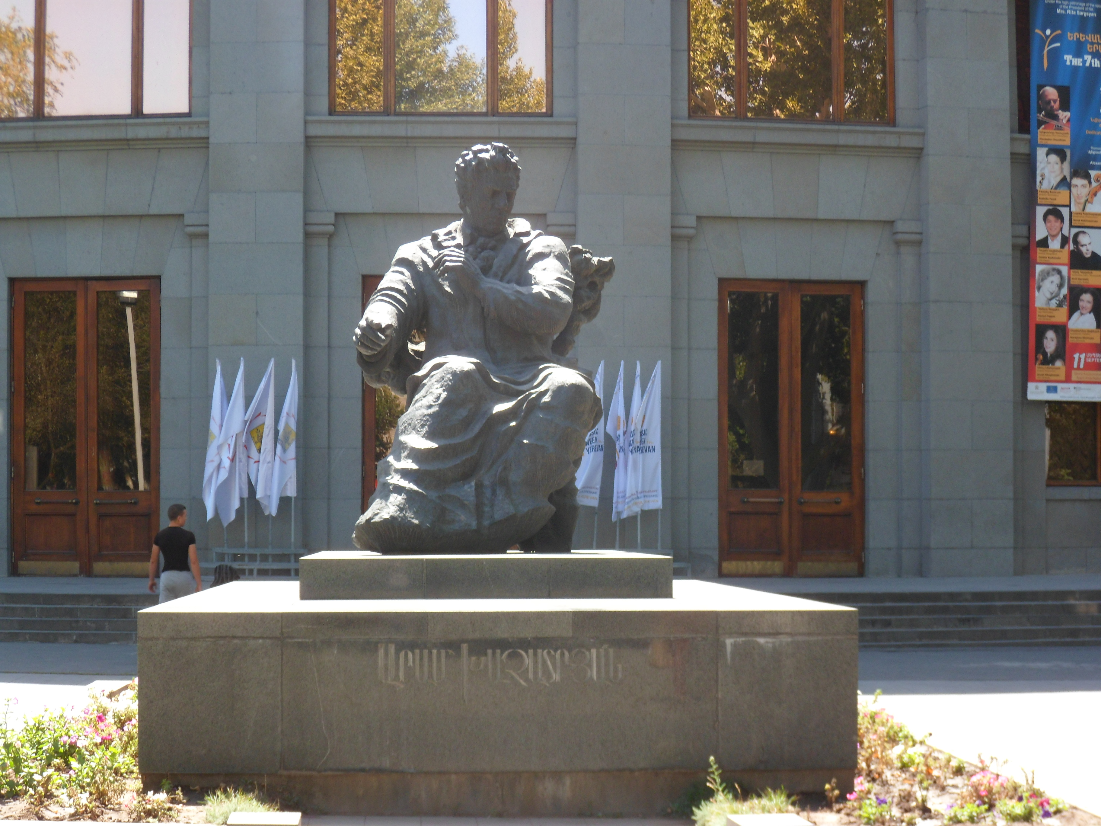 Հուշարձան` Արամ Խաչատրյանի 6/95.4